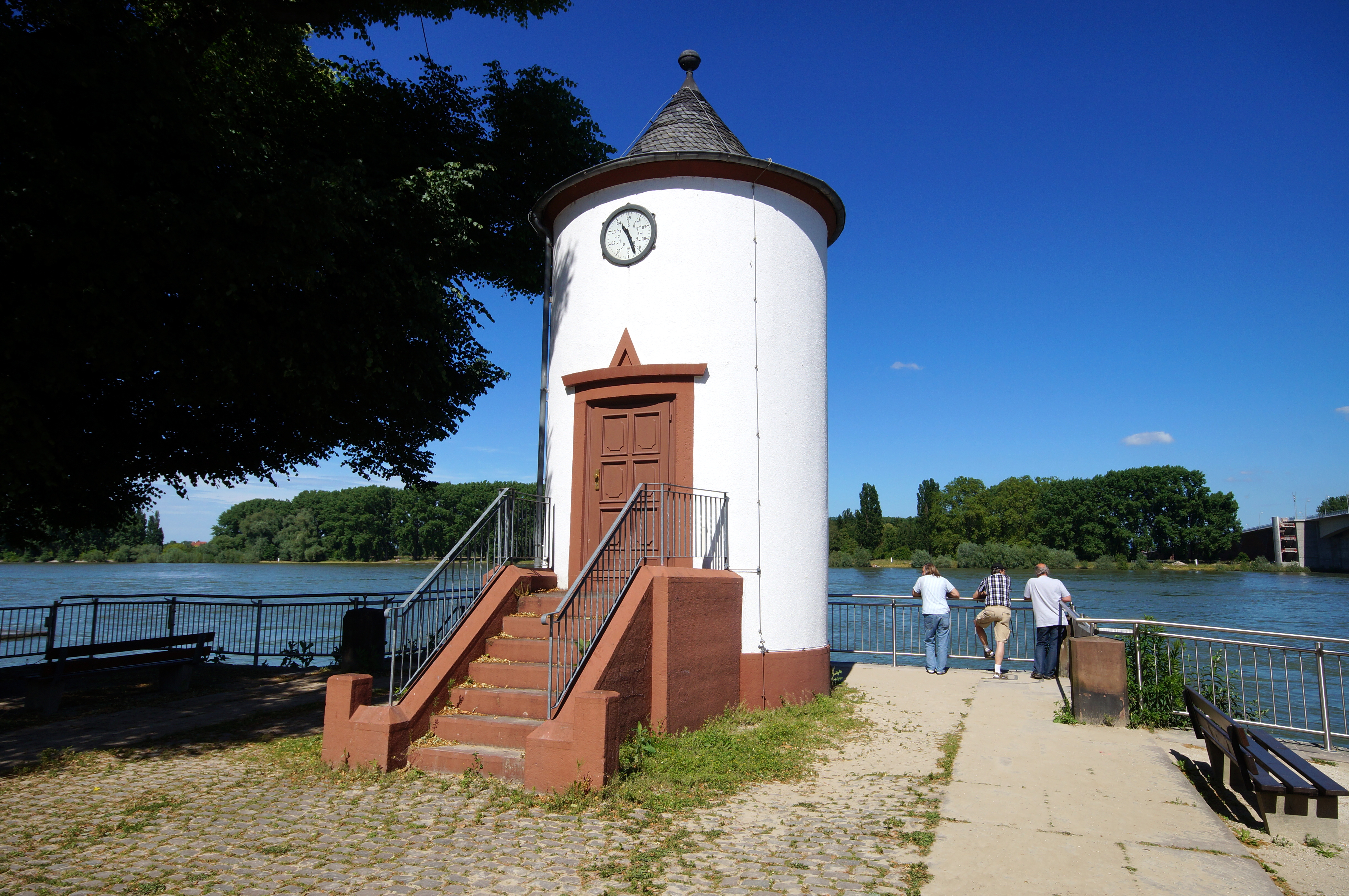 Das denkmalgeschützte Pegelhäuschen am Wormser Rheinufer